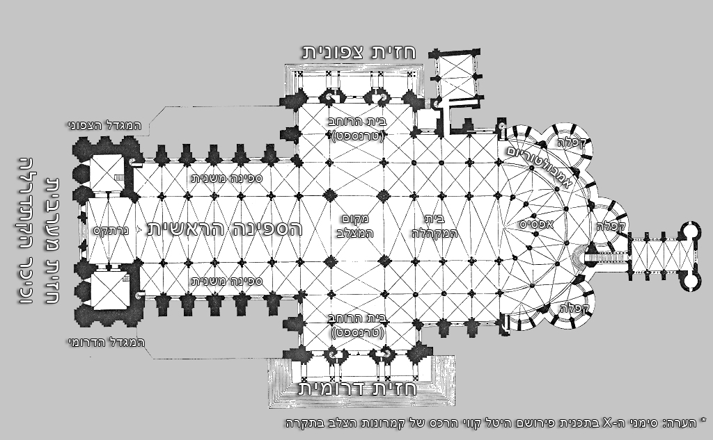 Plan de la cathédrale de Chartres, en hébreu.